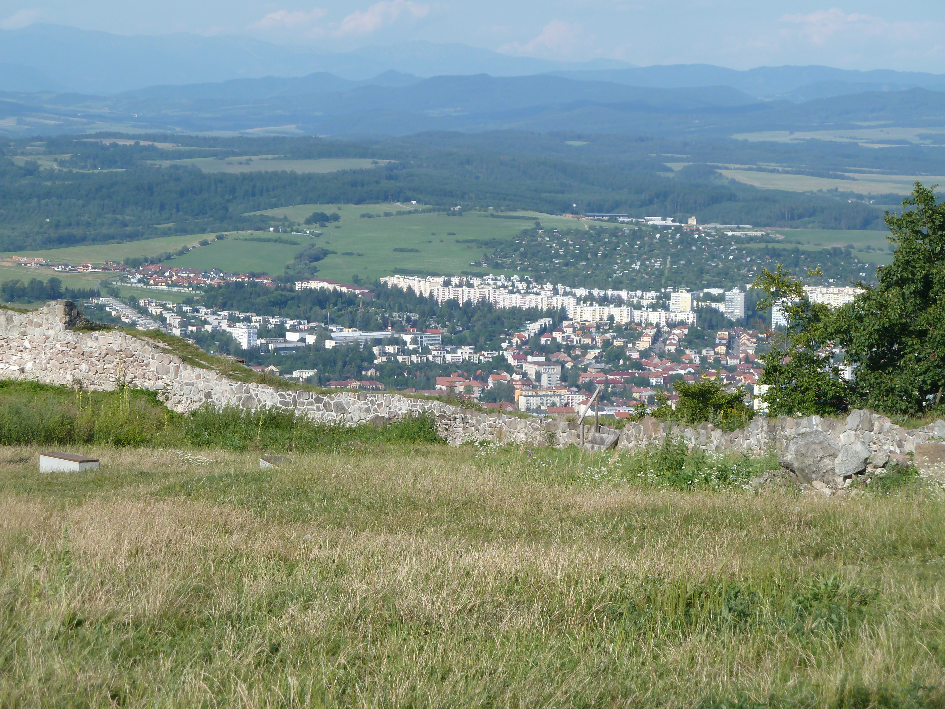 Zvolen z Pustého hradu